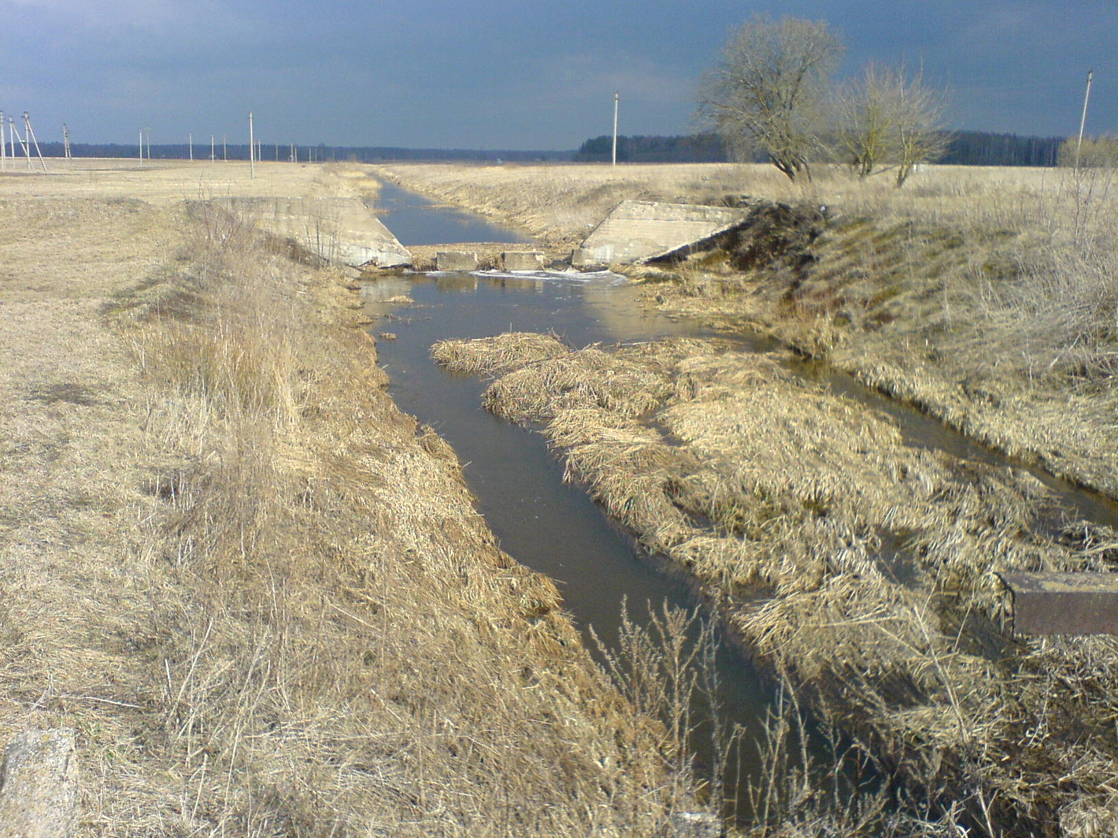 Juostos užtvanka Raguvėlėje